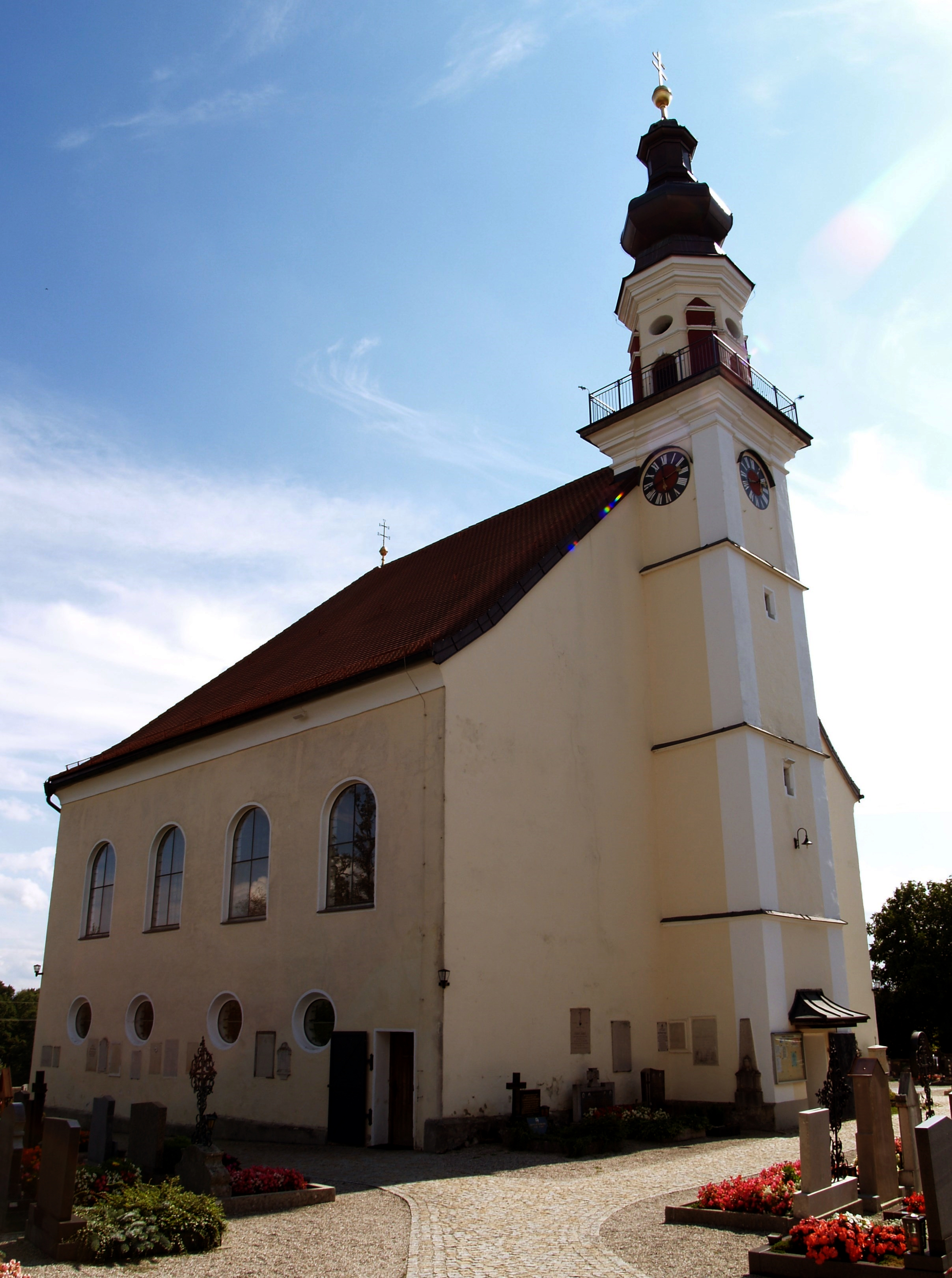 Kath. Pfarrkirche hl. Pantaleon und Friedhof